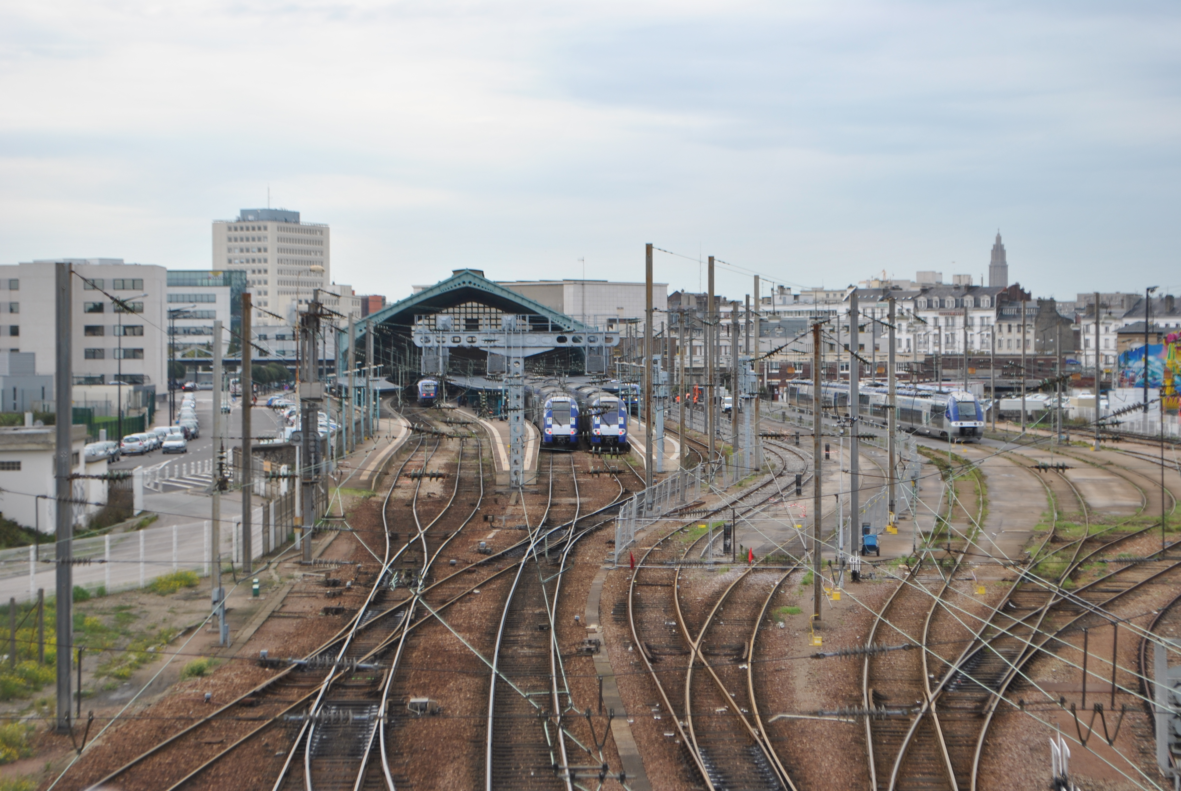 Panorama des installations de la gare du Havre. Terminus la ligne en provenance de Paris.